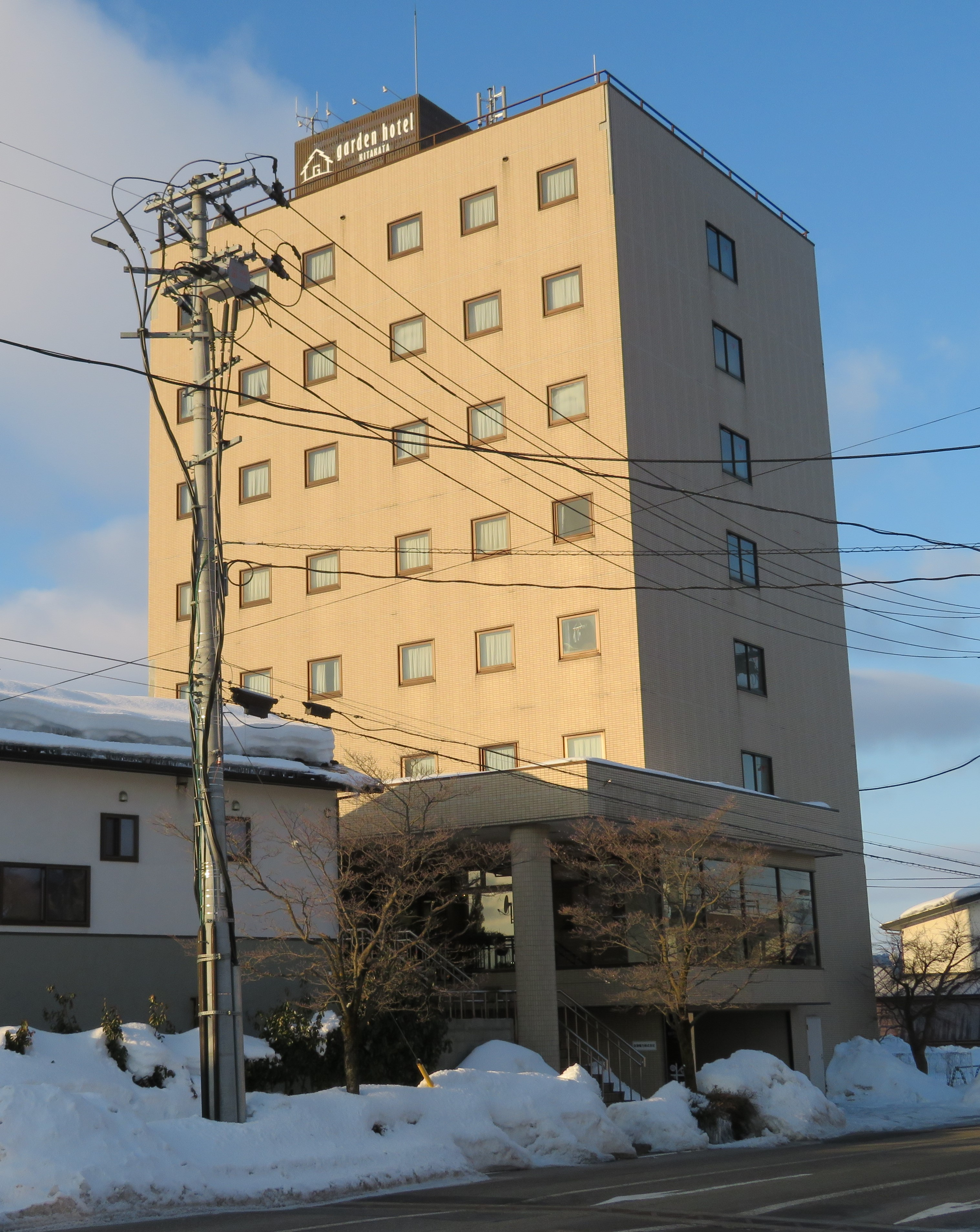 福島県喜多方市にあるガーデンホテル喜多方